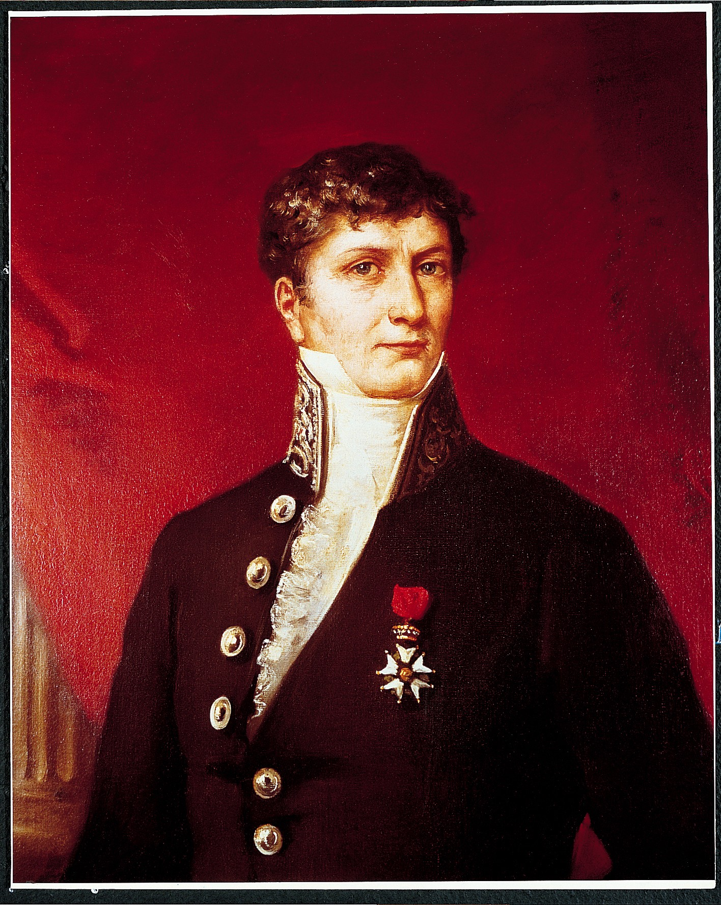 Jean-Baptiste Antoine O'Tard de La Grange (1773-1824), baron O'Tard, seigneur de Mérignac